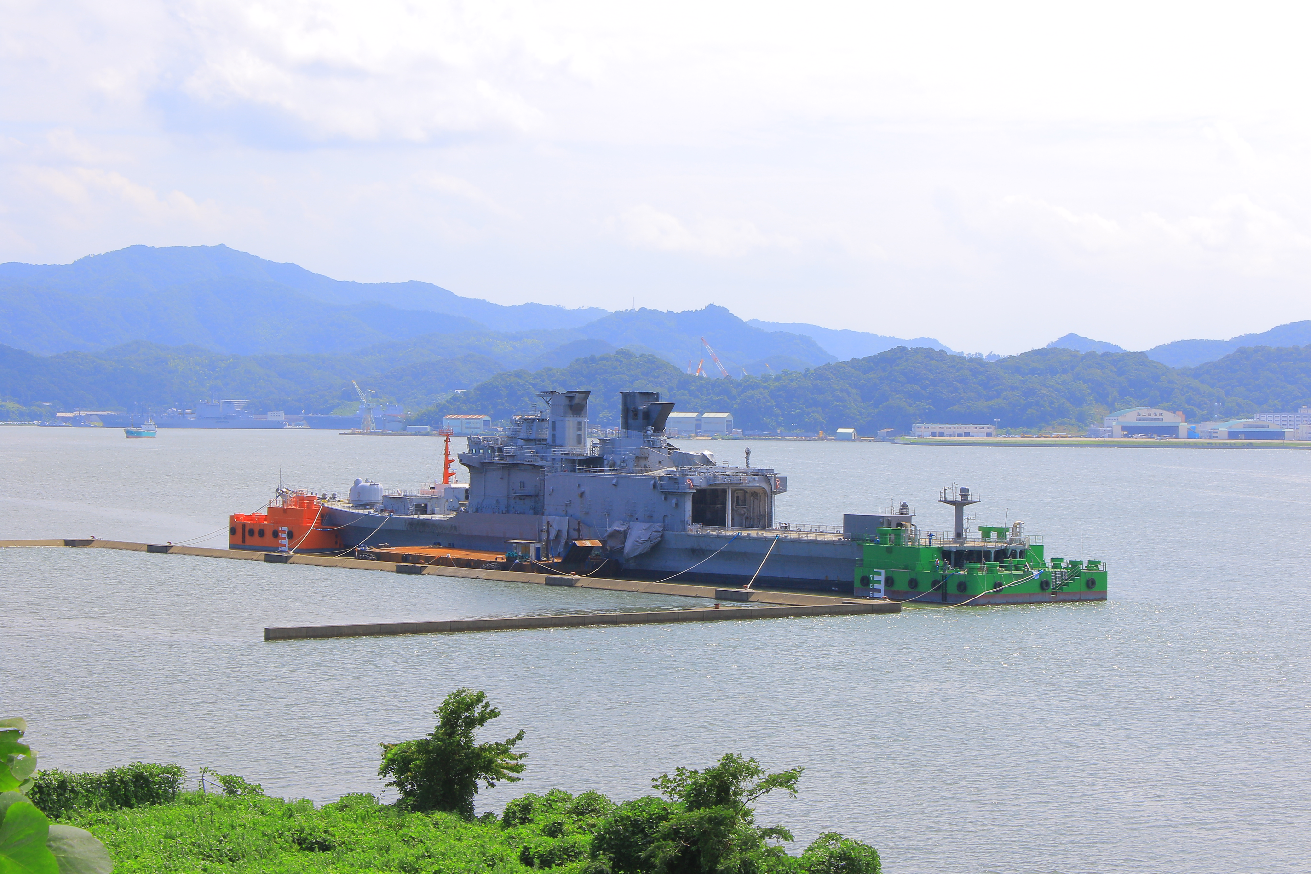 標的艦改装され電探や砲身など外された元しらね